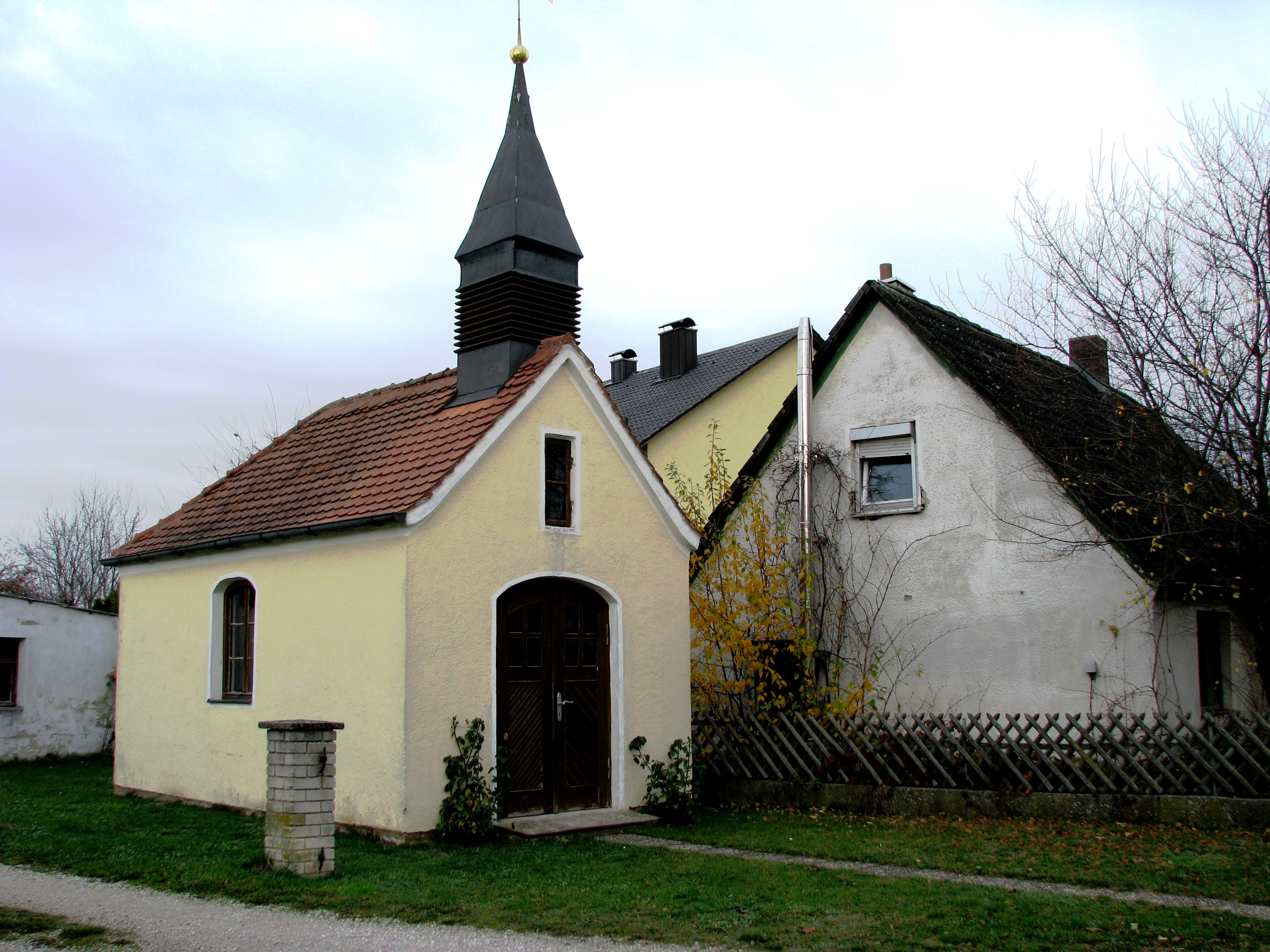 Kleinberghausen, Ortsteil der Stadt Freystadt im Landkreis Neumarkt in der Oberpfalz in Bayern, Dorfkapelle